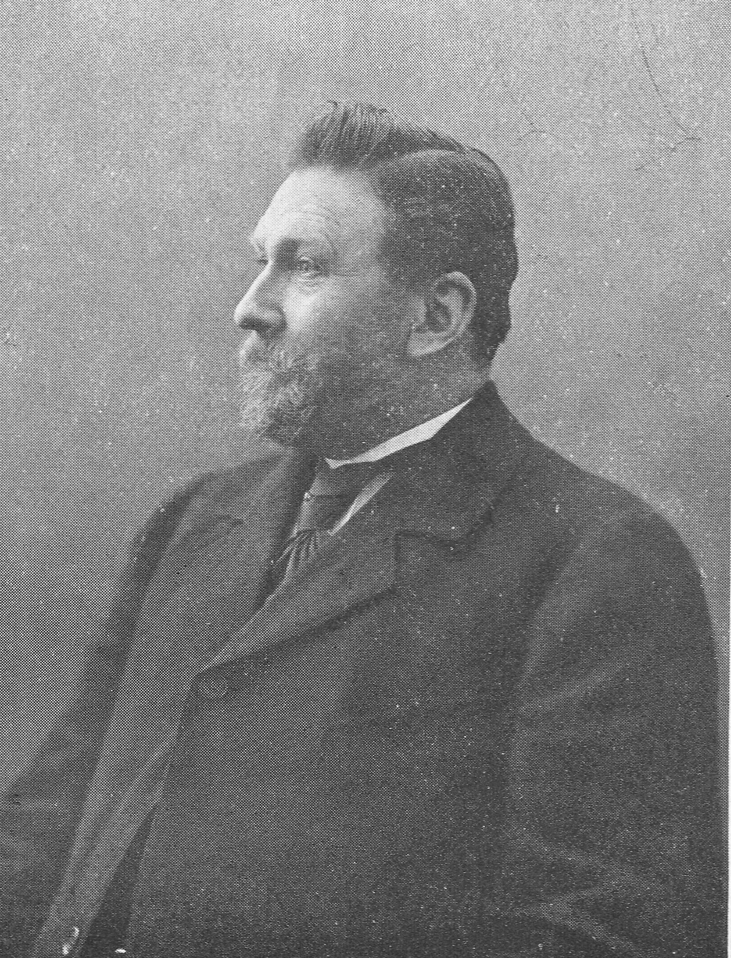 Hendricus Burgers, niederländischer Unternehmer, Begründer der Burgers-Eerste Nederlandsche Rijwielfabriek